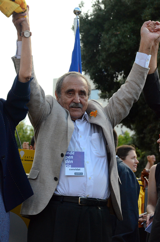 Eliseu Climent. La Via Catalana a Barcelona. Plaça Catalunya.